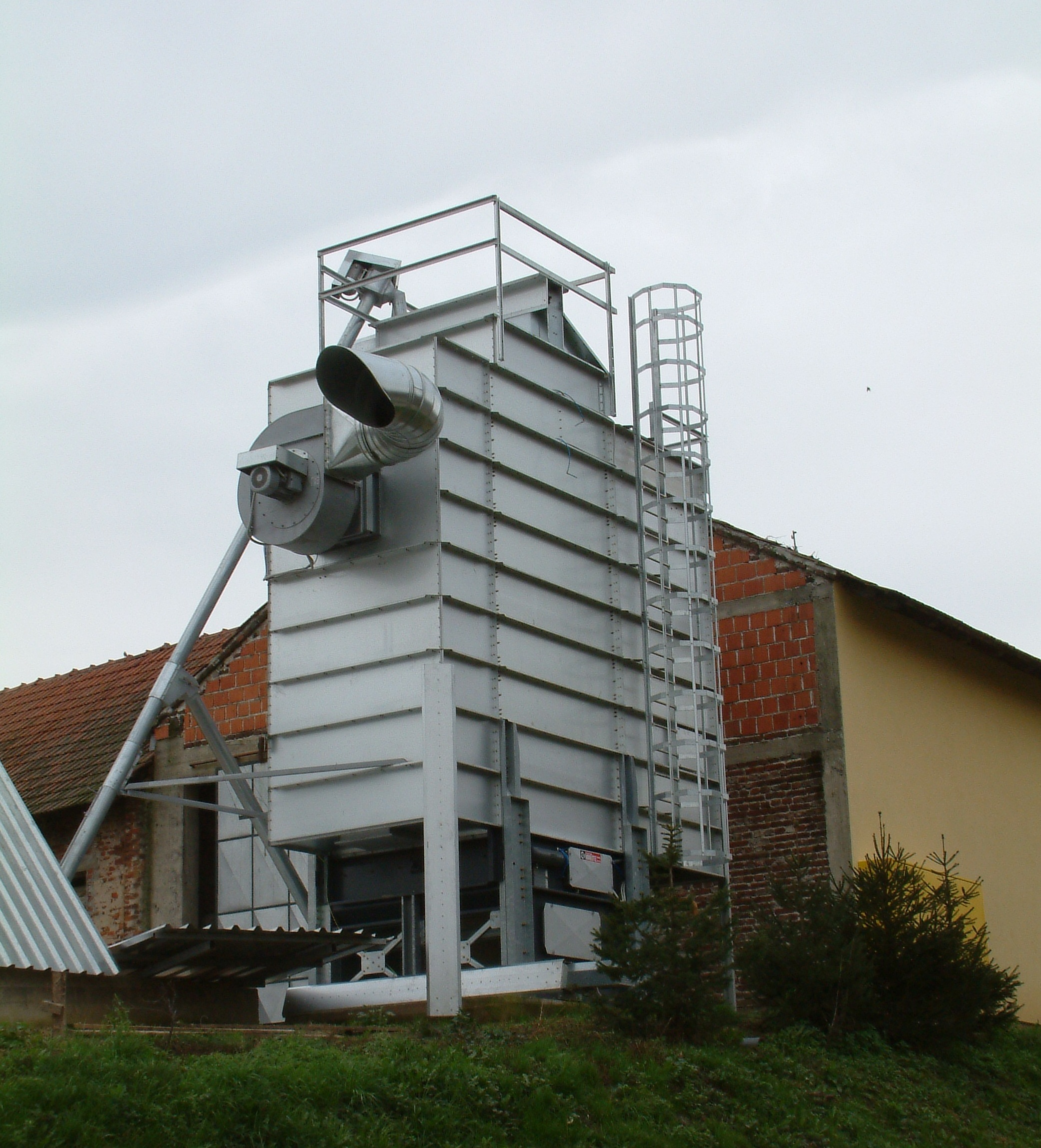 Мобильная зерносушилка